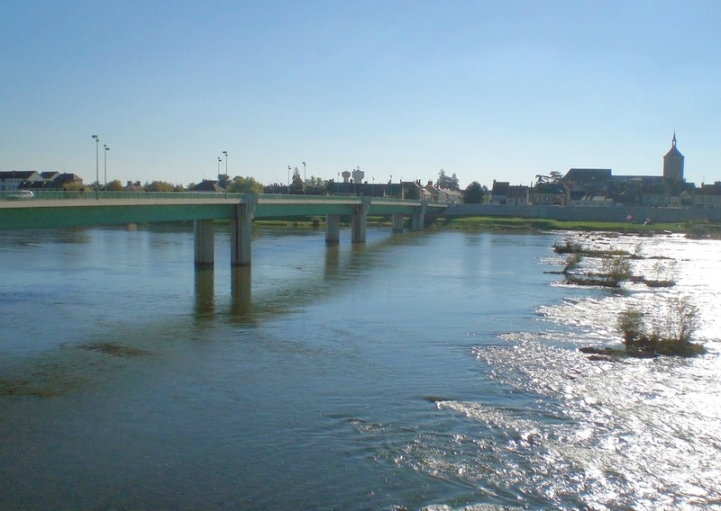 A gauche, le pont à ossature mixte de Jargeau depuis Saint-Denis-de-l'Hôtel, en rive droite de la Loire ; à droite, les restes de l'ancien pont de pierre détruit au XVIIIè siècle.